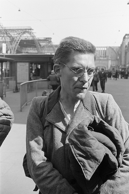 Original image description from the Deutsche Fotothek Portrait eines Heimkehrers